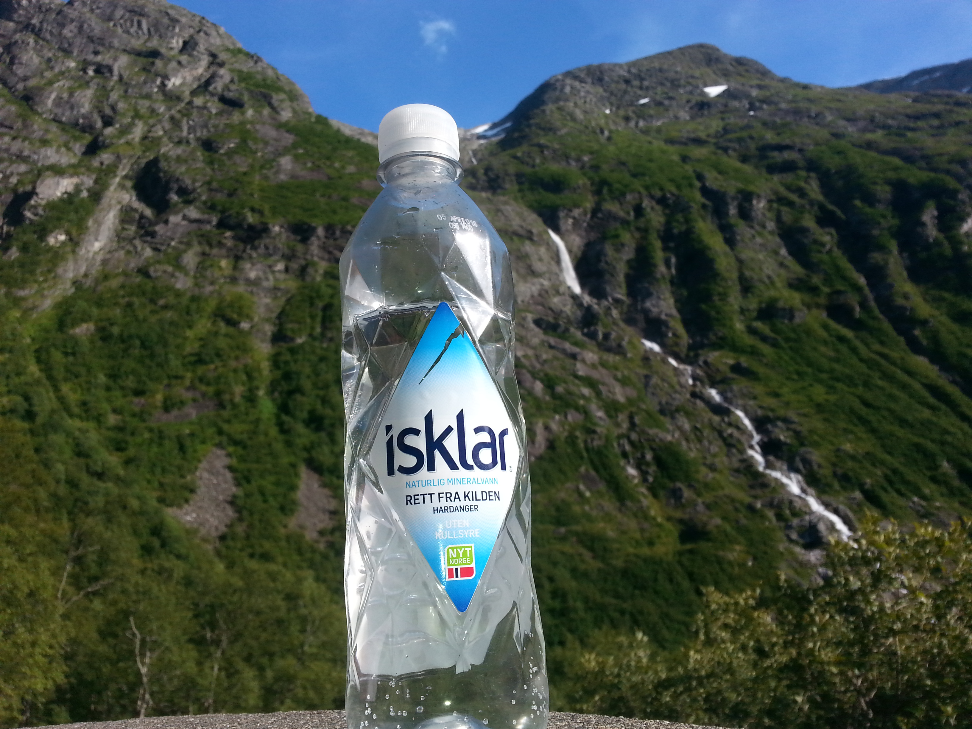 Flaskevann rett fra kilden i Hardanger, Hordaland.